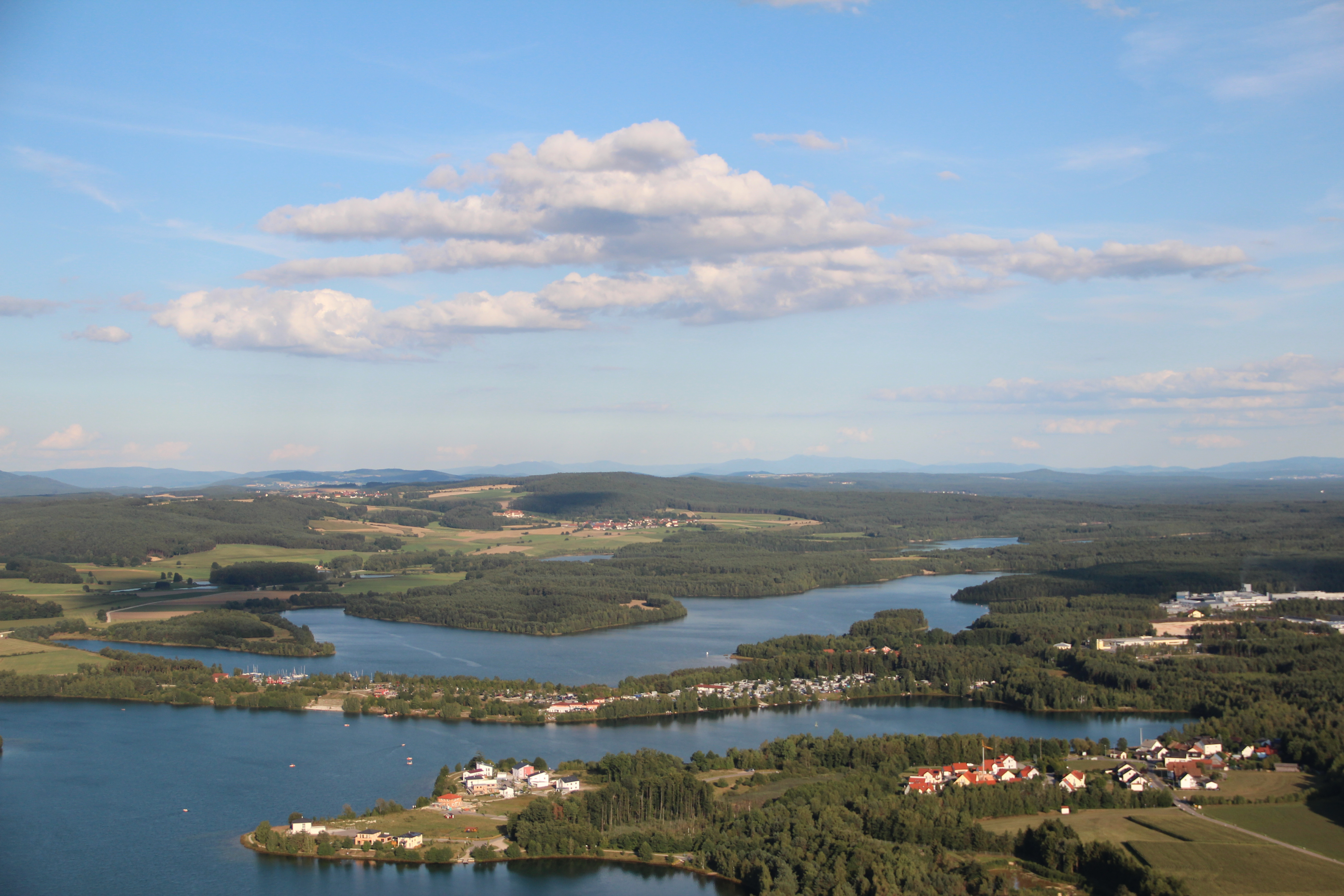 Oberpfälzer Seenland im Landkreis Schwandorf, Oberpfalz, Bayern (2012)